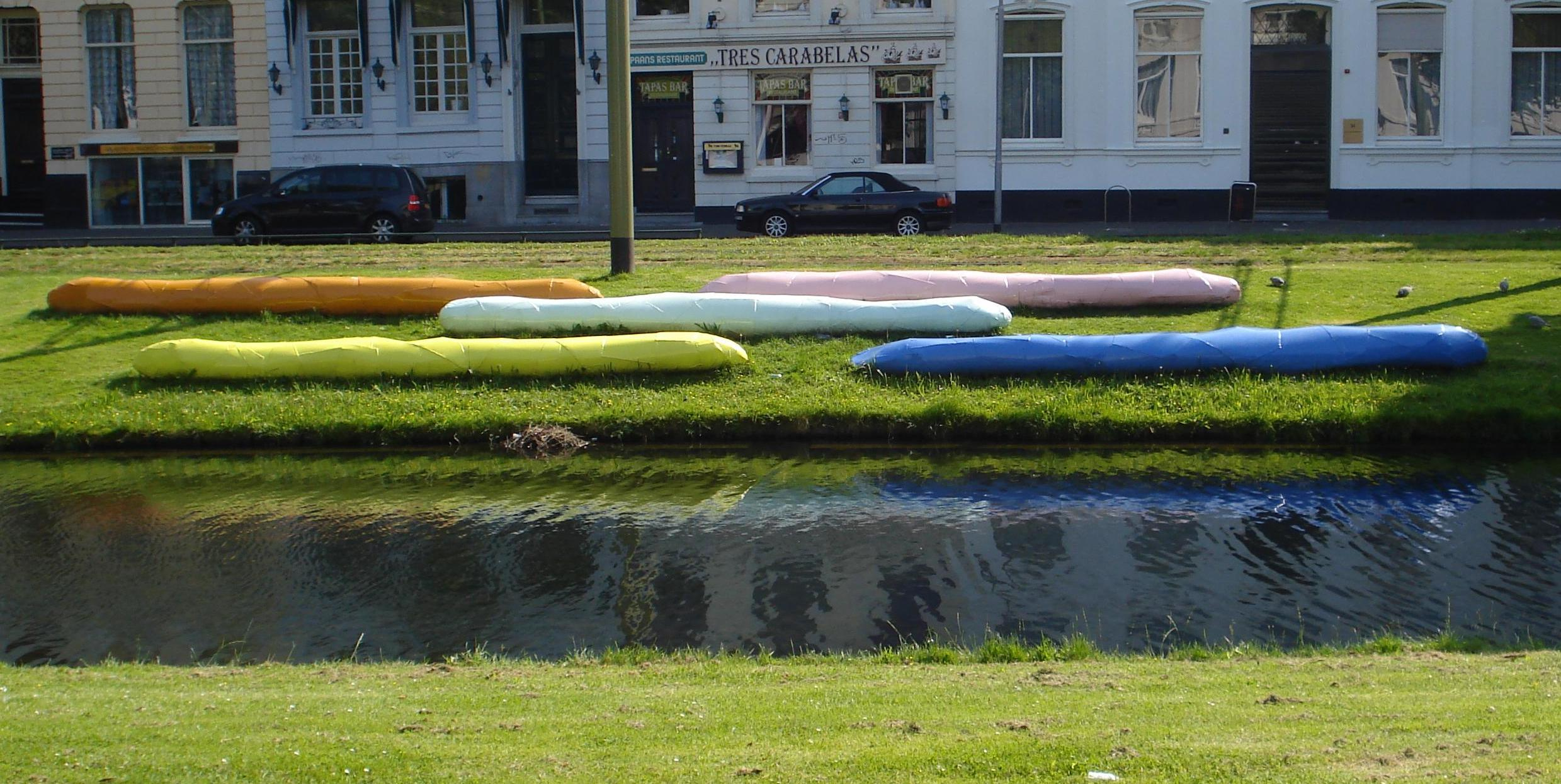 Rotterdam, Westersingel. Kunstwerk. Qwertz van Franz West. Rotterdam/The Netherlands